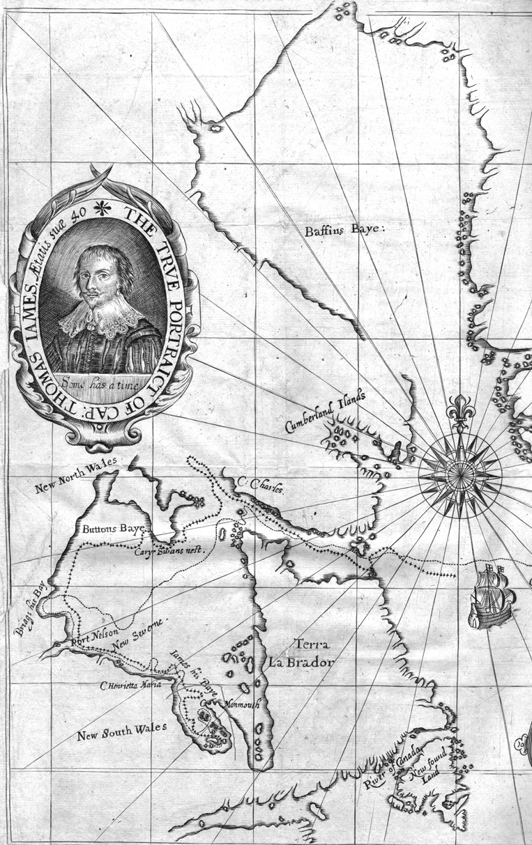 Mapa de la expedición de 1631-32 de Thomas James (1593?-1635?)